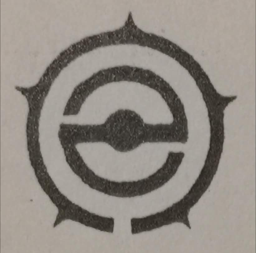 2004年に合併により廃止された大宮町（現・京丹後市大宮町）の町章